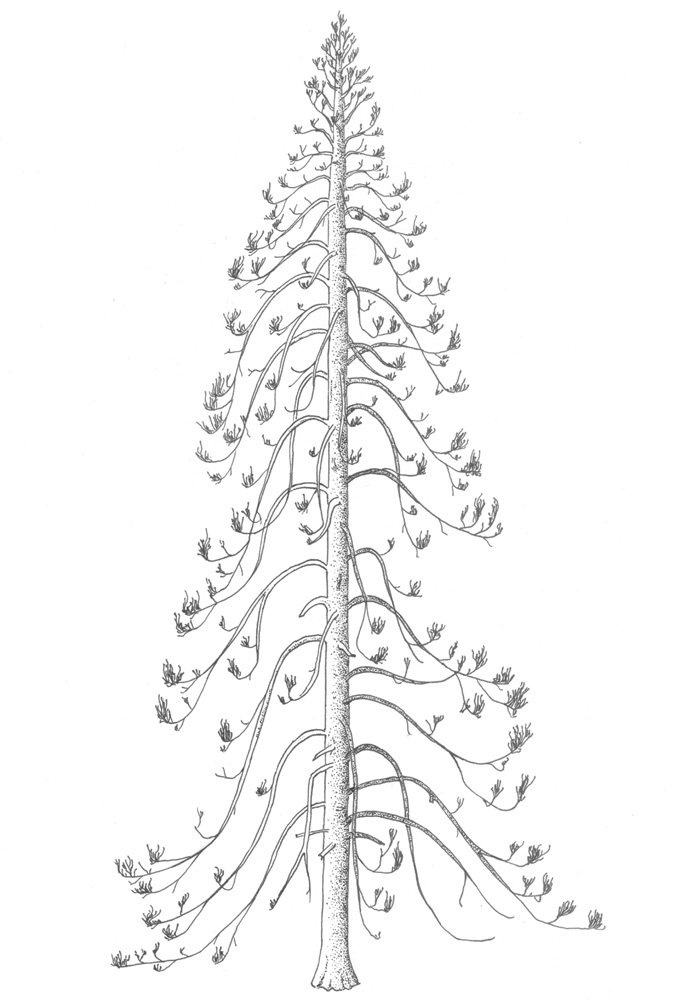 Reconstrucción artística del vegetal Araucarioxylon arizonicum según las descripciones dadas para la especie a partir de sus restos fósiles del Triásico. La altura máxima estimada para la especie es de 60 metros y su diámetro de 60 centímetros. Se observa el tronco columnar con ramificación monopódica y las ramas laterales crecen con un ángulo de 90º respecto al eje y presentan geotropismo negativo. La estructura de las hojas es desconocida.